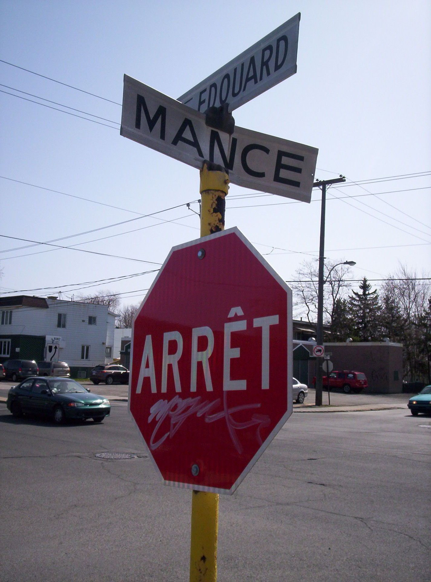 Quartier Laflèche